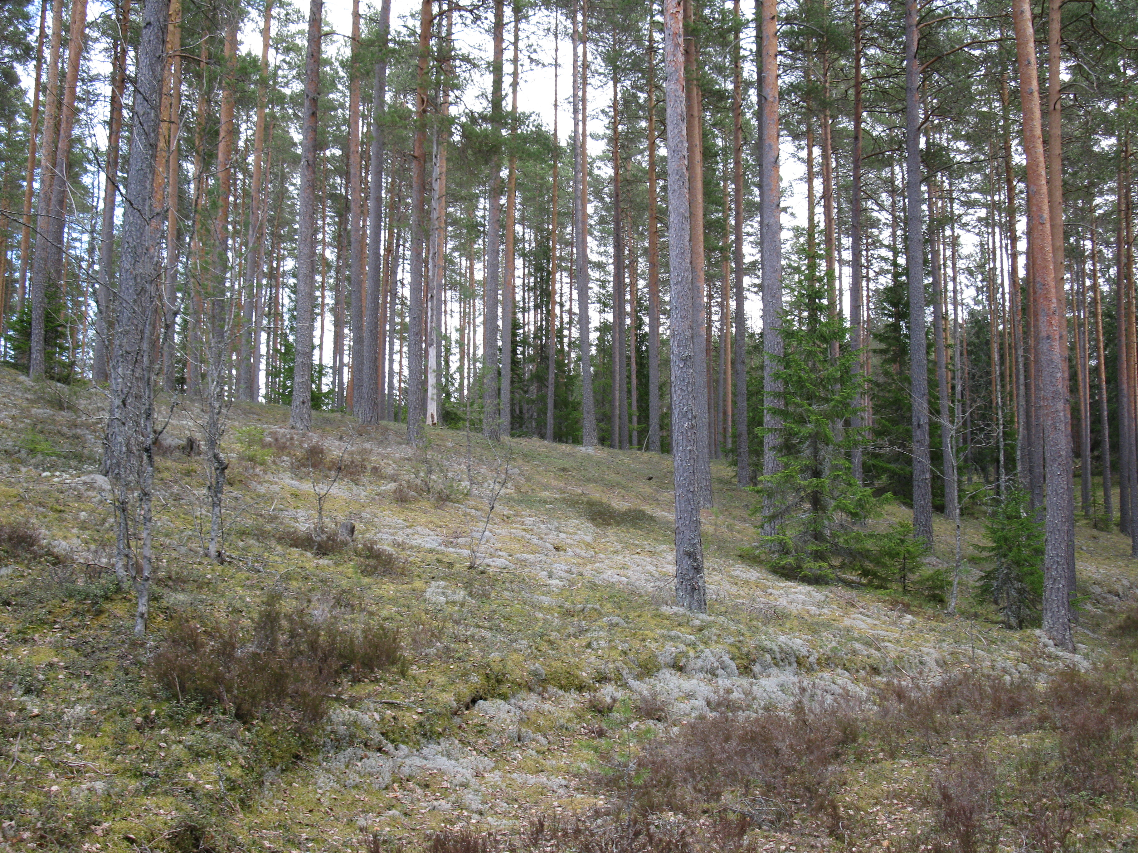 Kolmannen Salpausselän reunamuodostumaa Kiikalannummella Hyyppärän harjualueen Natura 2000 -alueella Somerniemellä Somerolla